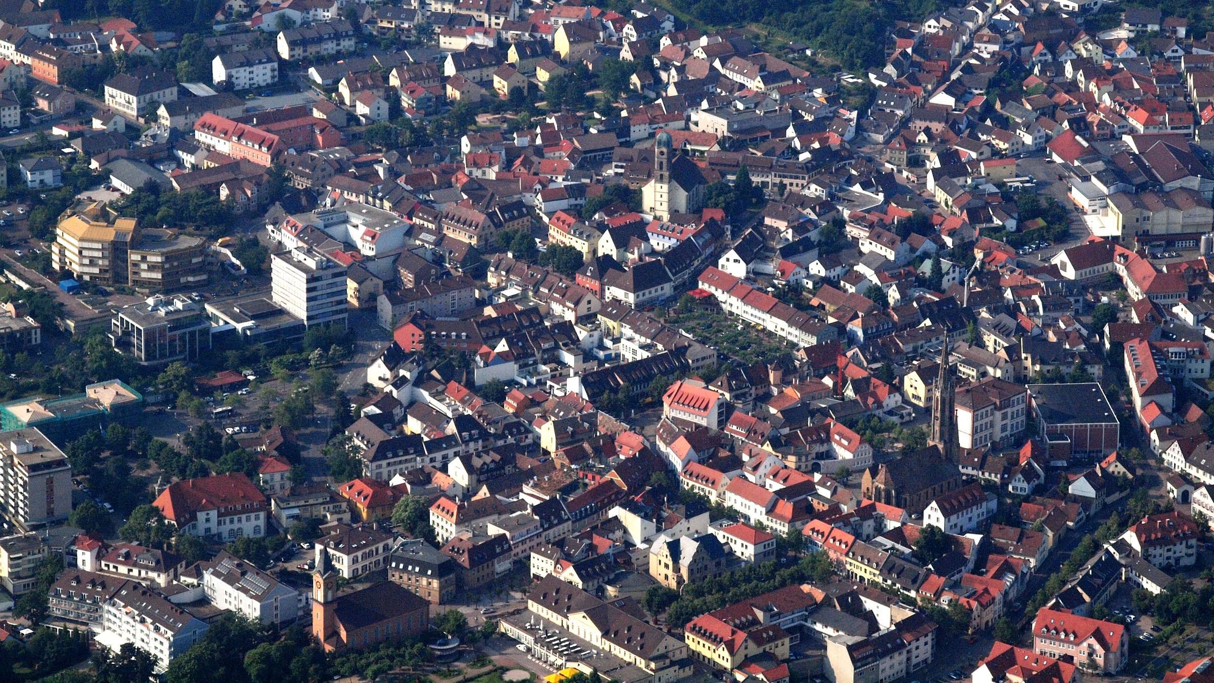 Zentrum von Bad Dürkheim